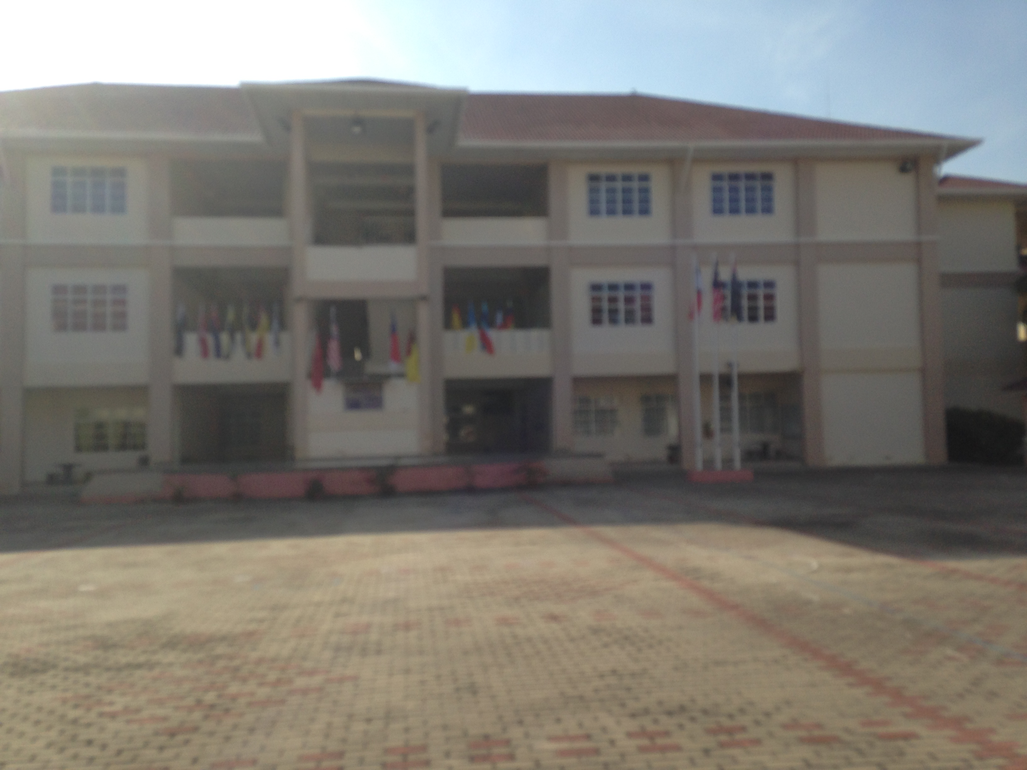 panorama sekolah